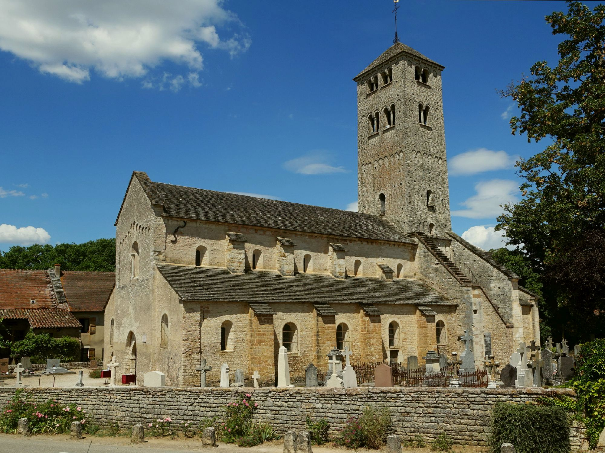 Romanische Kirche Saint-Martin de Chapaize in Burgund